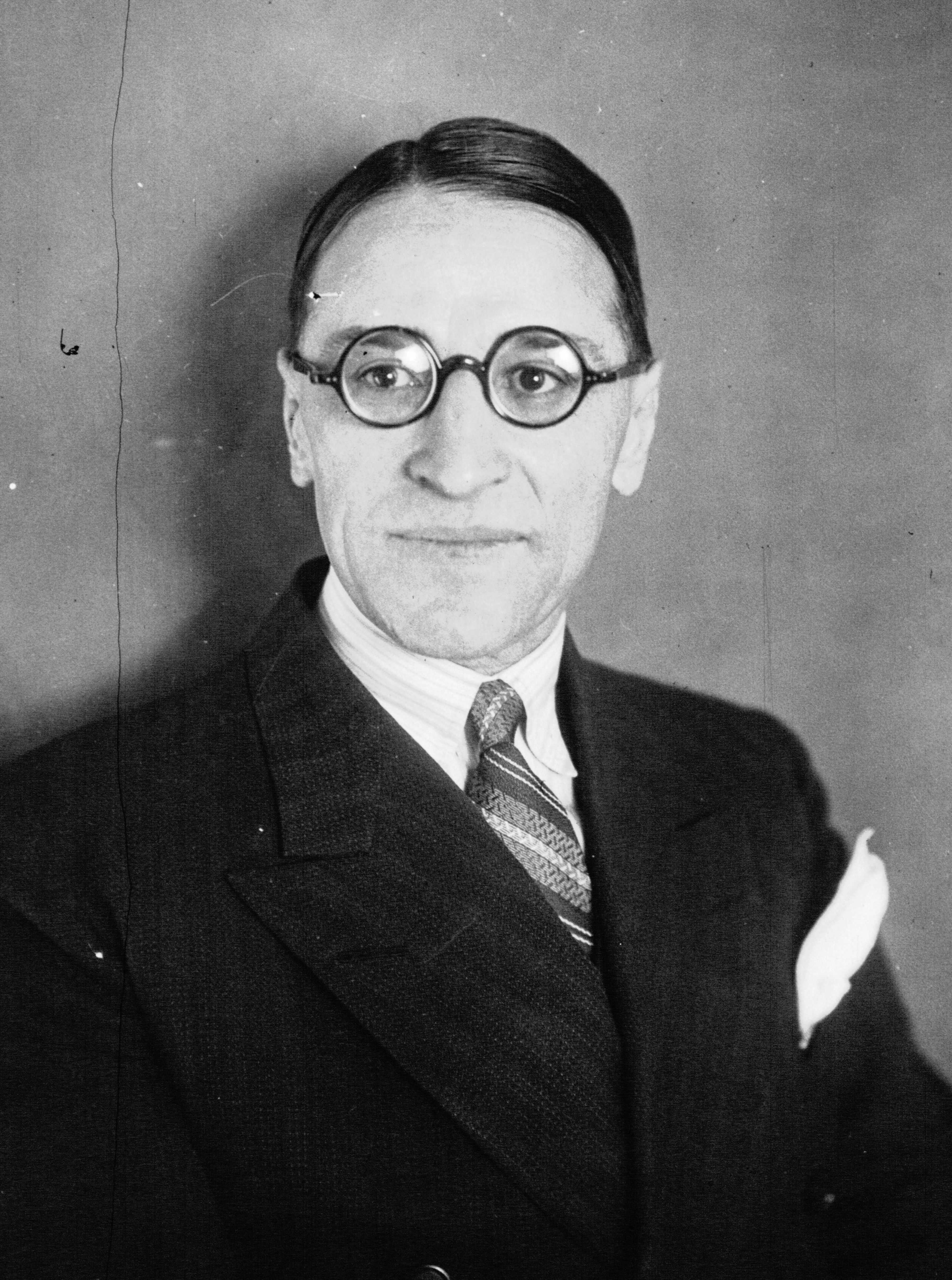 Campinchi, avocat et député de la Corse : photographie de presse.